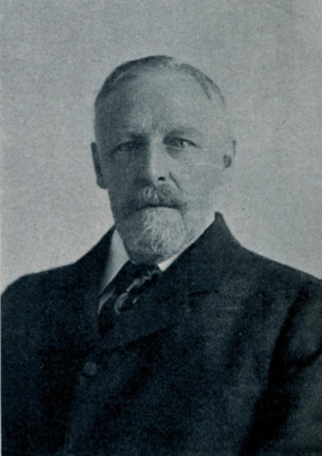 Sir Montagu Sharpe